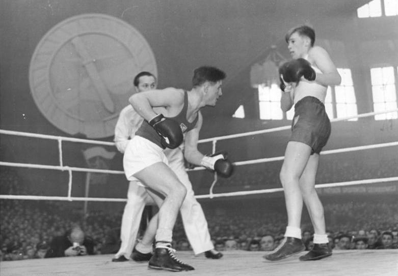 Drogosz, Zachara Zentralbild V. 4.3.1952 Internationaler Boxkampf in Wroclaw. Am 17. Februar 1952 fand in Wroclaw in der Republik Polen ein Boxkampf zwischen einer polnischen und tschechoslowakischen Boxmannschaft statt. Die Polnischen Boxer siegten mit 14:6. UBz:Die Federgewichtler Drogosz (Polen) und Zachara (CSR) beim Kampf.